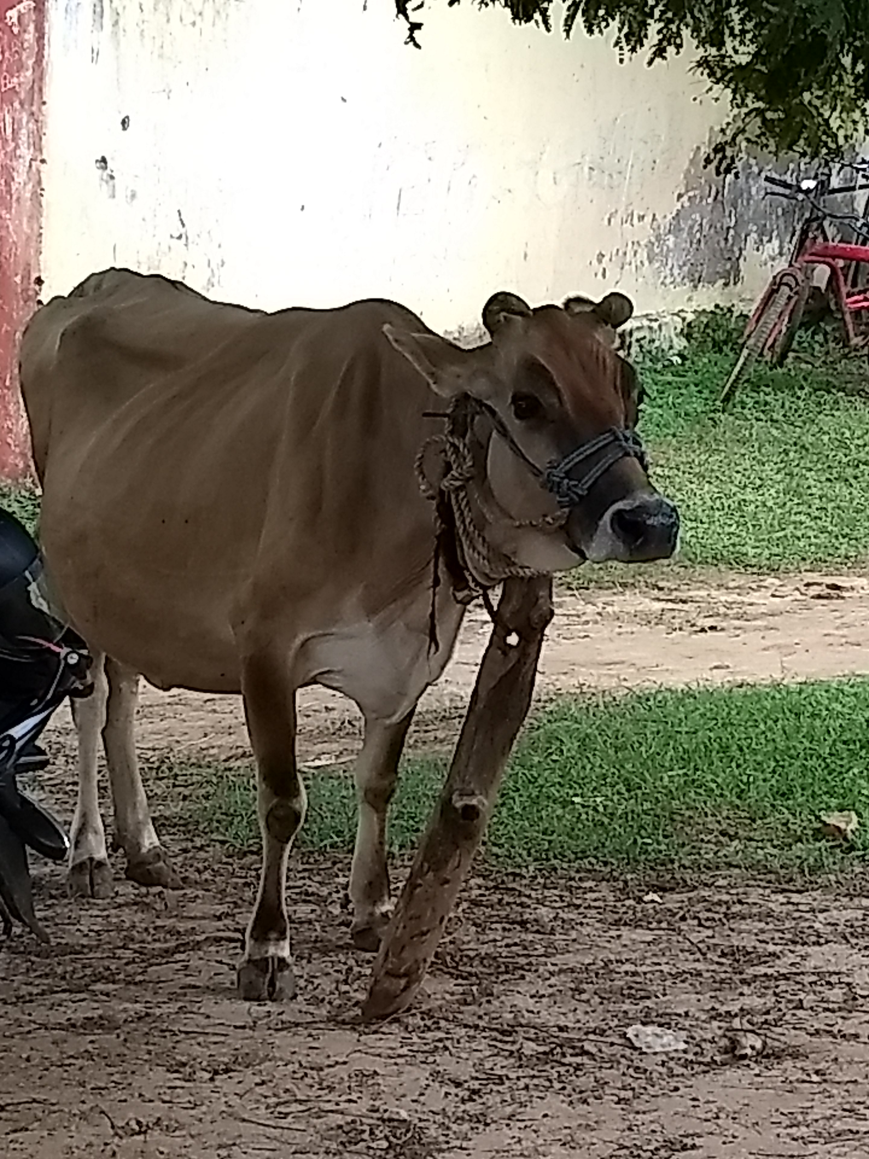 గుదిబండ దొంగపశువు మెడకు వ్రేలాడ గట్టు బరువుకొయ్య. ఆకతాయి పశువులను అదుపులో పెట్టడానికి దానిమెడలో బండను కడతారు. ఆ బరువుకు ఆ పశువు పరుగు పూర్తిగా ఆగిపోతుంది. ఆ బండా ముందుకు కదలదు. ఆ పశువునూ కదలనివ్వదు.